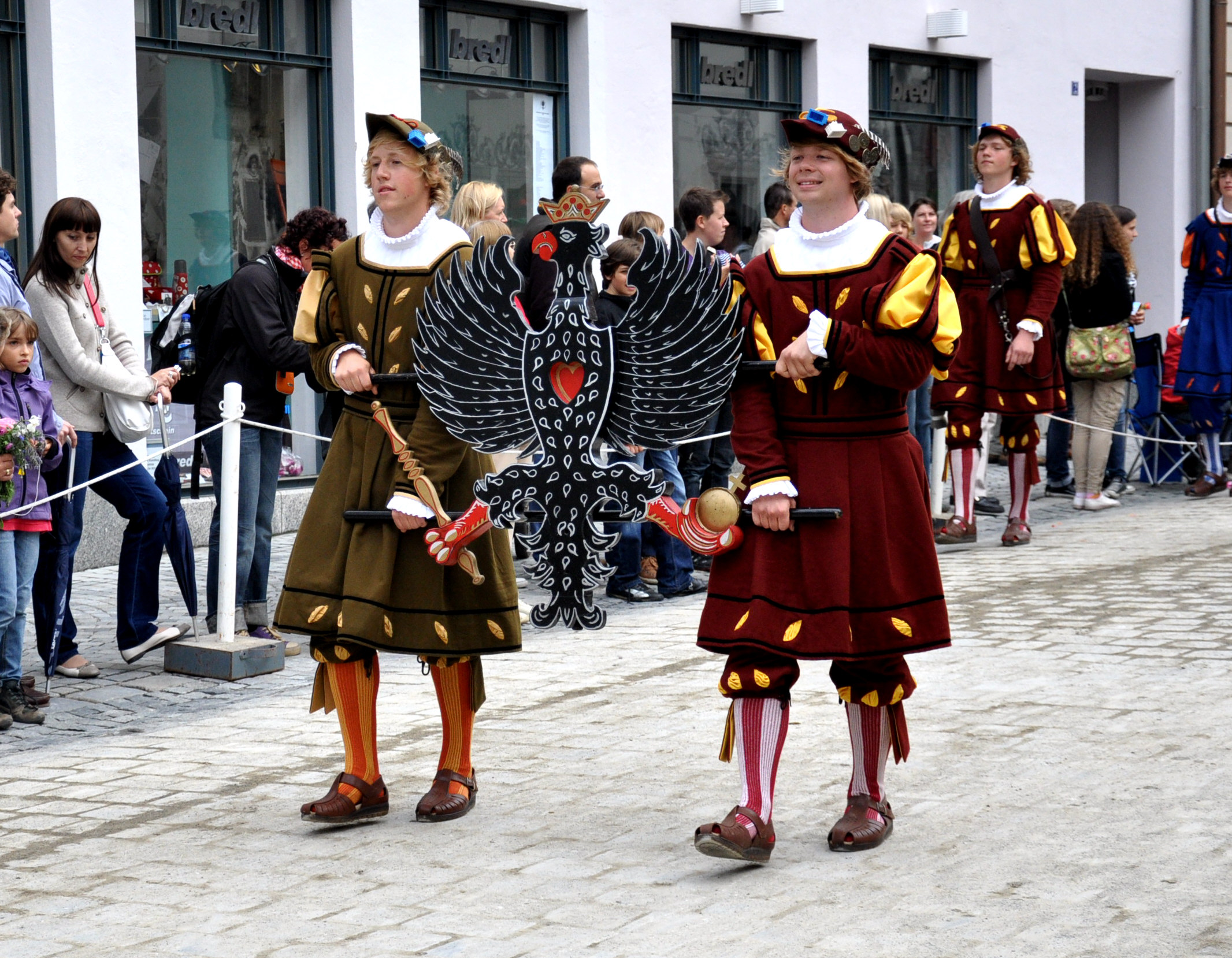 Rutenfest Ravensburg 2011, Festzug am Rutenmontag Adlerträger der Landsknechte (Alte Spohngruppe)